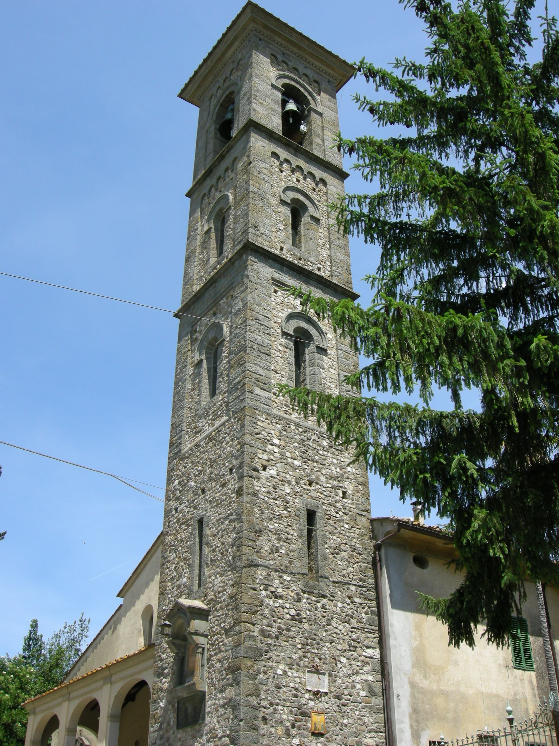 Chiesa di santo stefano a lucignano